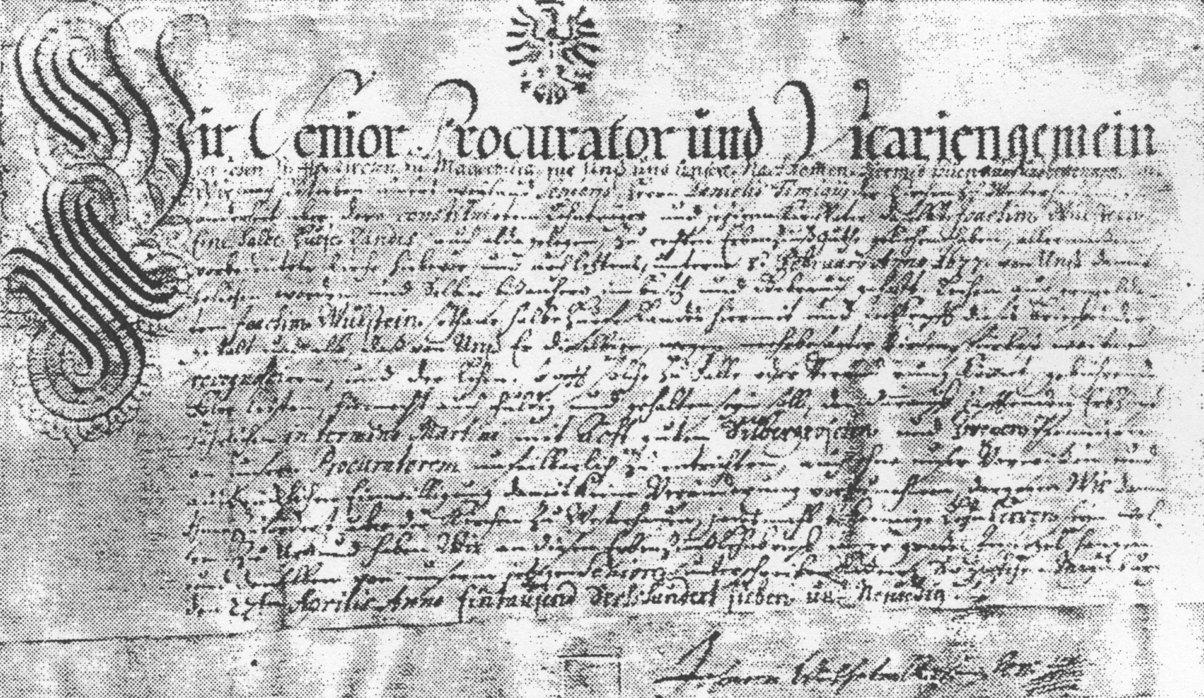 Lehnsbrief der Kirche zu Westerhüsen mit folgendem Inhalt: "Wir Senior Procurator und Vicariengemein der Hohen Stiffts-Kirchen zu Magdeburg für Unß und unsere Nachkommen hiermit thuen kund und bekennen, daß Wir, nach Absterben unseres weyland Seniors, Herrn Danielis Timigy, der Kirchen zu Westerhausen, insonderheit aber dero constituirtem Lehnträger und jetzigem Kirch Vater daselbst, Joachim Wulstein, Eine halbe Huefe Landes, auch allda gelegen, zu rechtem Erbenzinßguthe geliehen haben, allermaßen vorbedeutete Kirche hiebevor, und noch letztens, unterm 8. February Anno 1677 von Unß damit beliehen worden, und Selbige bißanhero im Besitz und Gebrauch gehabt. Leihen auch ermeldetem Joachim Wulstein sothane halbe Huefe Landes hiermit und in Krafft dieses Brieffes, dergestalt und also, daß von Unß Er dieselbige, wegen mehrbesagter Kirchen, fürbaß weiter recognosciren, und der Lehen so offt solche zu Falle oder Veränderung kömmet, gebührende Folge leisten, hiernechst auch schuldig und gehalten seyn soll, den darauff hafftenden Erbzinß jährlichen in termino Martini mit Acht guten Silbergroschen und Zweyen Pfennigen an unsern Procuratorem unteilbarlich zu entrichten, auch ohne unser Vorwißen und ausdrücklichen Einwilligung damit keine Veränderung vorzunehmen, dargegen Wir dann Ihme, zuvörderst aber der Kirchen zu Westerhausen, jedesmahl beknnige Lehn Herren seyn wollen. Zu Urkund haben wir an diesen Erbenzinß Lehnbrieff unser großes Insiegel hangen und denselben von unserm jetzigen Seniore unterschreiben laßen. So geschehen Magdeburg den 27ten Aprilis Anno Eintausend Sechshundert sieben und Neunzig. Johann Wilhelm Rost"